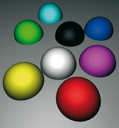 Adibide hauekin ikusten dugu nola argiaren koloreak objektuen koloreen perzepzioa aldatzen du. Horregaitik ondorioztatzen dugu: 1.- Azal zuriek argiaren kolorea hartzen dute zuri koloreak argiaren kolorea aldatzen ez duelako. Argi zuriak ere ez du objektu azaleen kolorea aldatzen. 2.- Argia koloreztatuak kolore bereko azal baten gainean ez du objektuaren kolorea aldatzen. 3.- Azal batean beltza ikusiko dugu baldin eta jotzen duen argiak badu hain zuzen ere azal horrek errebotatzen ez duen argi espektroren zatia (kolorea). Argi horiaren irudian, kasu, beltza bada bola urdina horrek espektro osoa hartzen du urdina izan ezik. 4.- Azal batean ikusten dugun kolorea nahasketa kengarria da non argiaren argi espektroari azalak hartzen duen espektro horren zatia kentzen diogun.